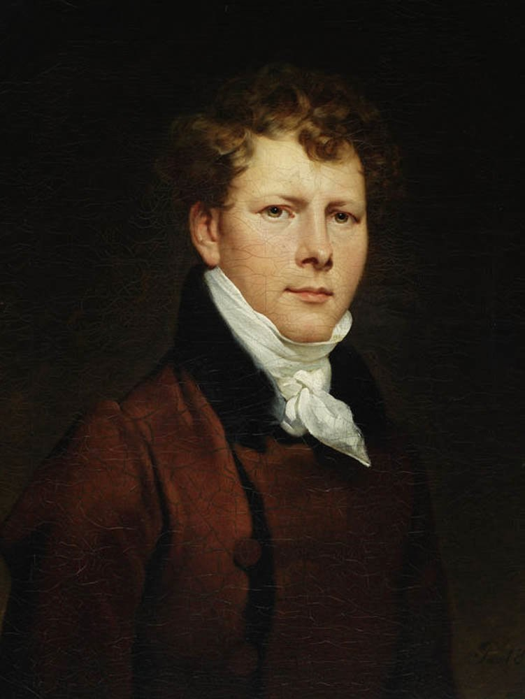 Portret własny